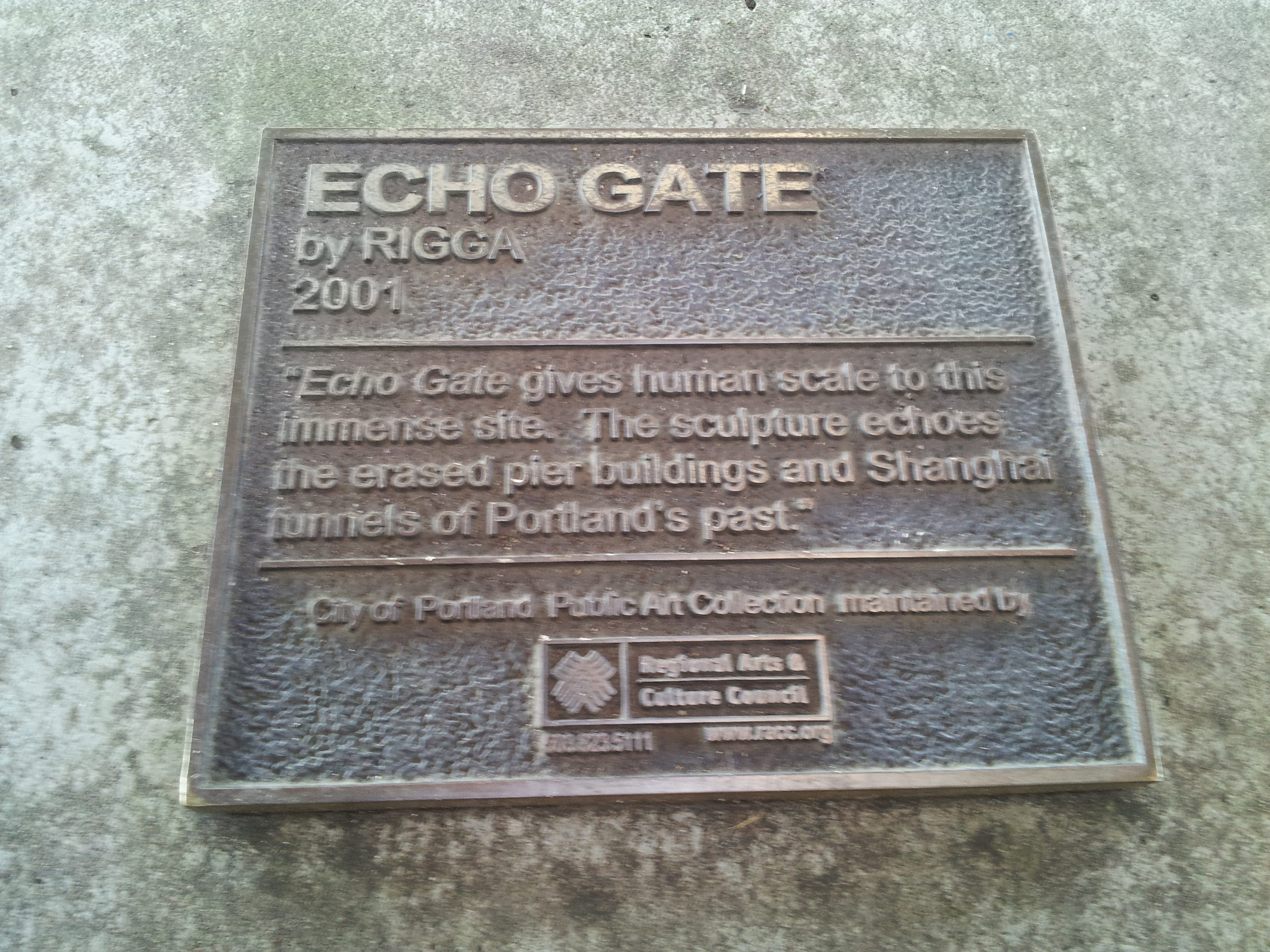 Echo Gate plaque, Portland, Oregon (2015)